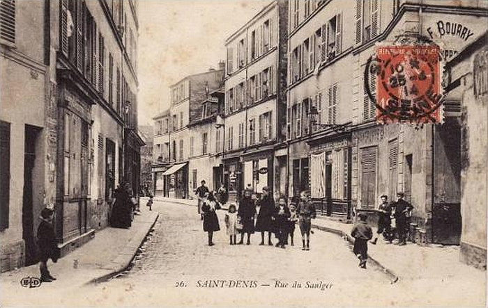 Carte postale de la rue du Saulger à Saint-Denis, par la suite renommée rue Jean-Jaurés, puis rasée dans les années 1970.